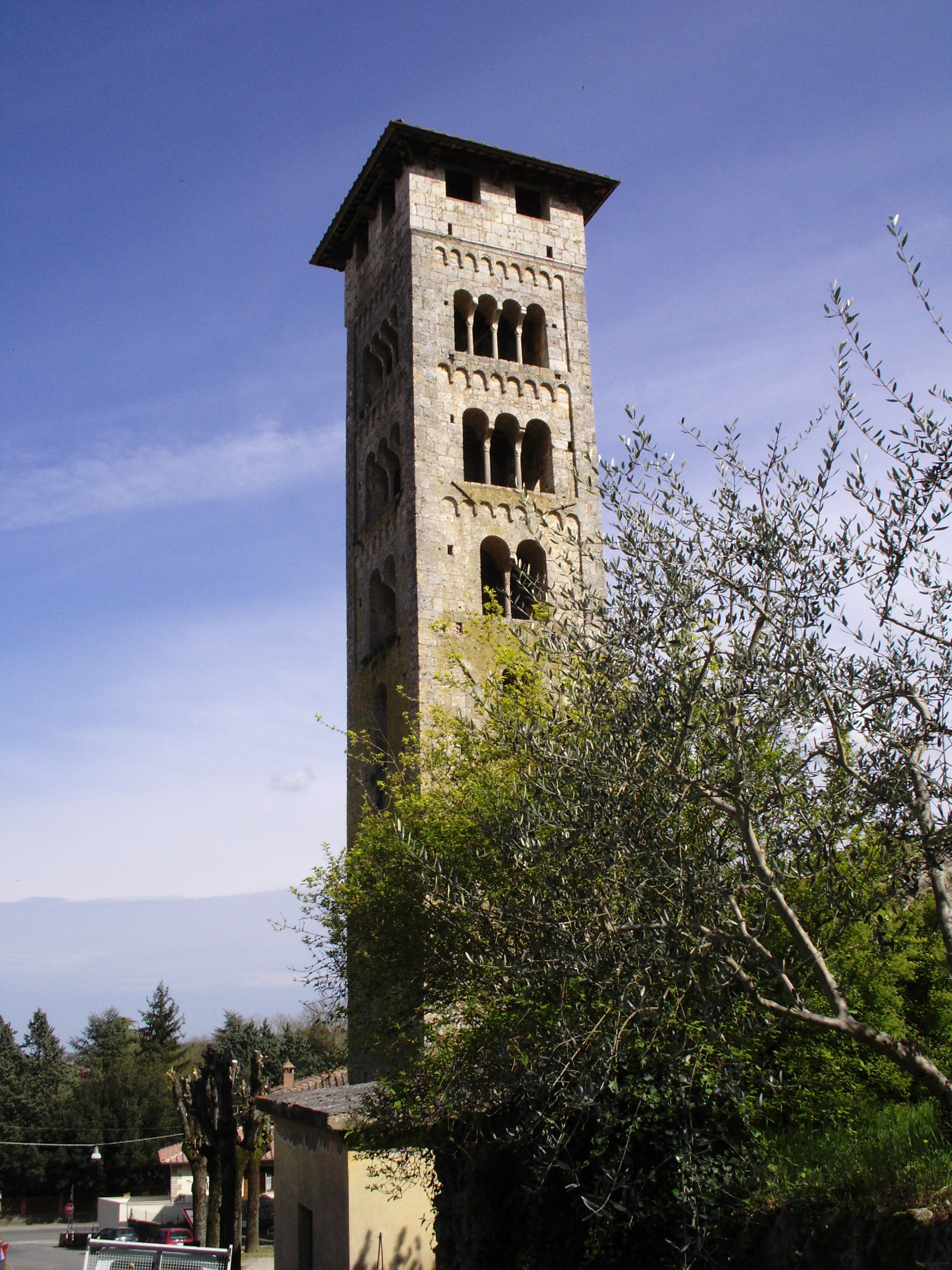 Rosia, Comune di Sovicille, pieve di San Giovanni Battista, campanile